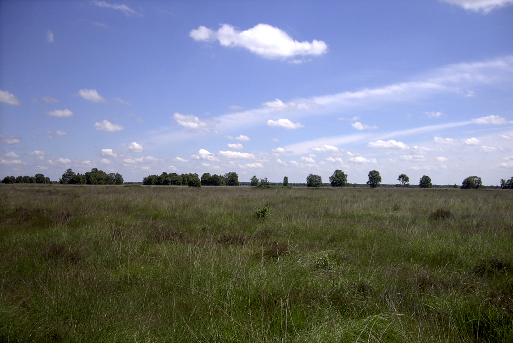 Moorheide am Ewigen Meer, Naturschutzgebiet „Ewiges Meer und Umgebung“